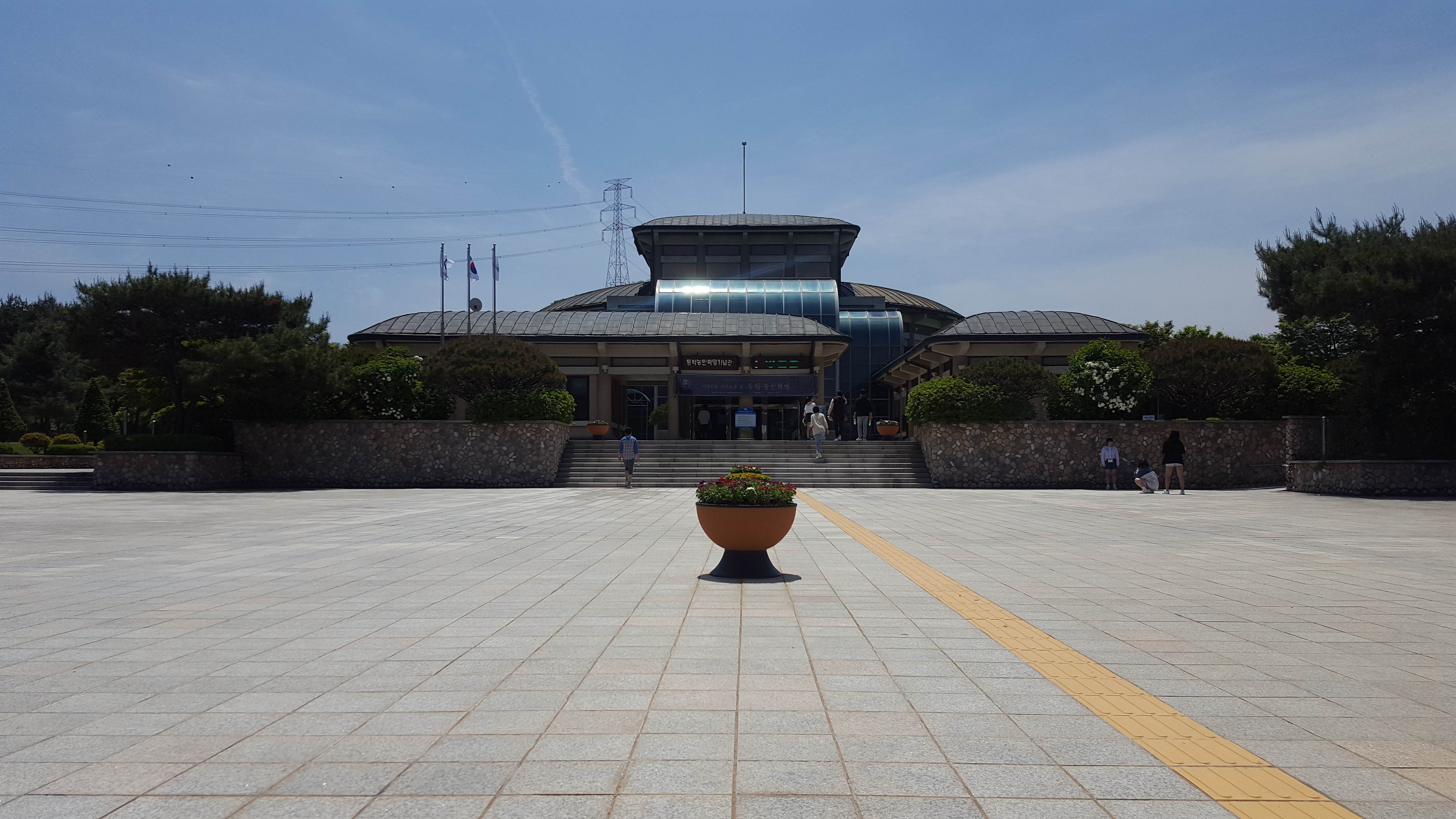 동학농민혁명기념관